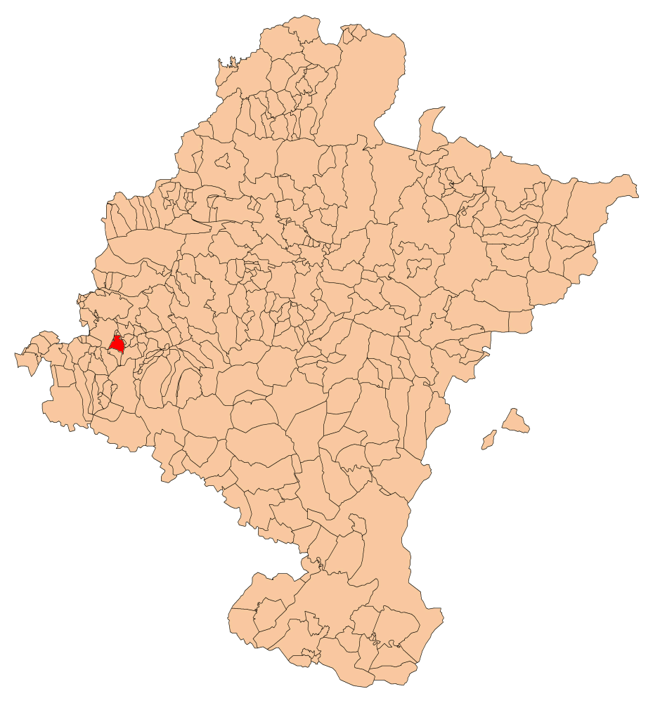 Piedramillera herria Nafarroako mapan kokatua.